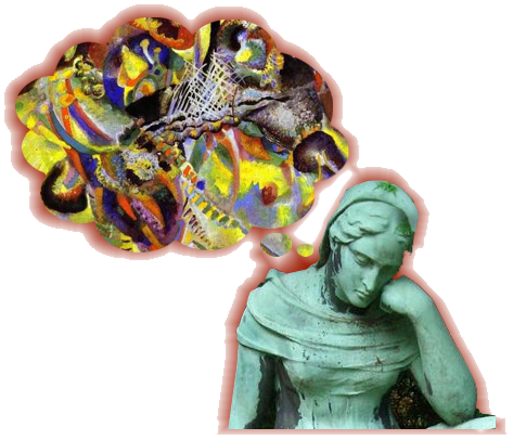 Familiengrab des Otto Schurig 1874-1920, Spitzenfabrikant in Plauen, mit einer Trauernden von der WMF, Friedhof I in Plauen